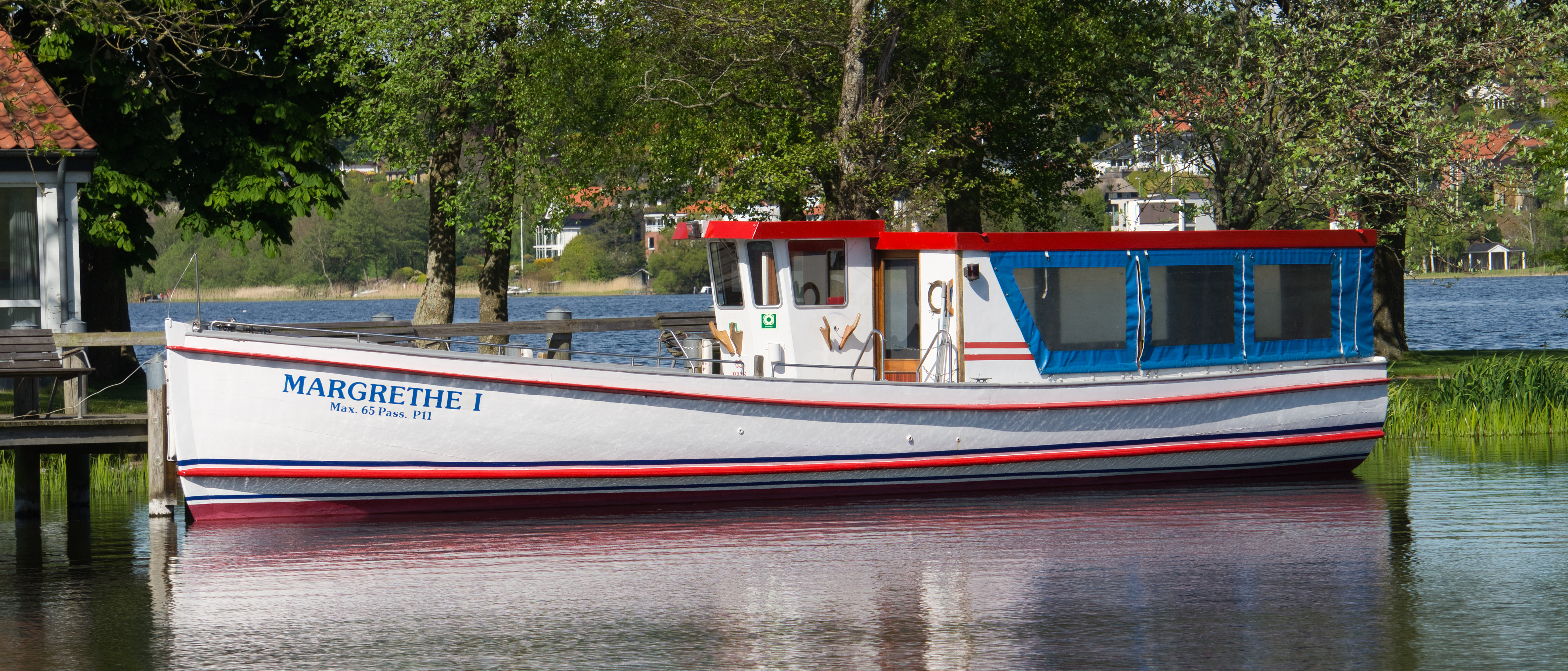 Turbåden Margrethe ved Borgvold